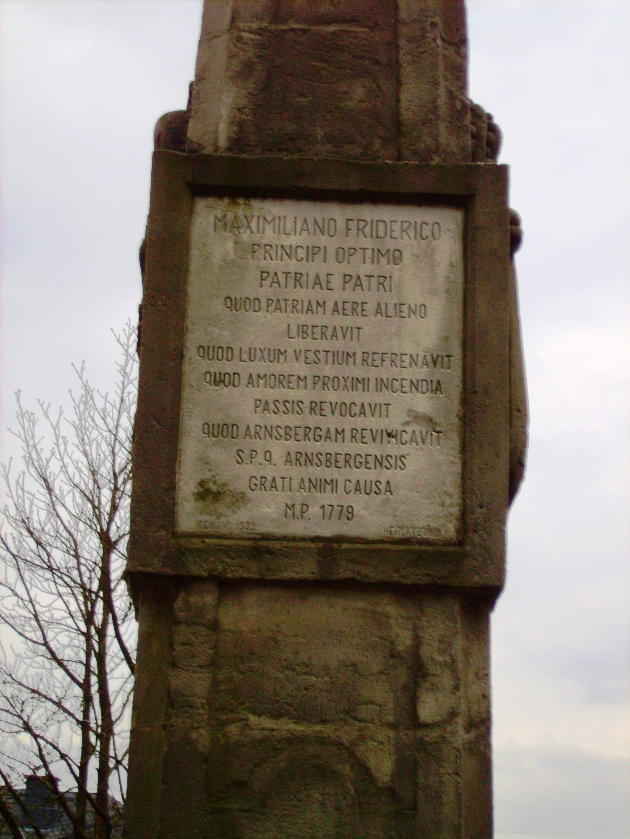 erneuerte nördliche Inschrift des Maximilianbrunnen in Arnsberg